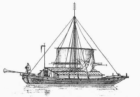 Верховой досчаник